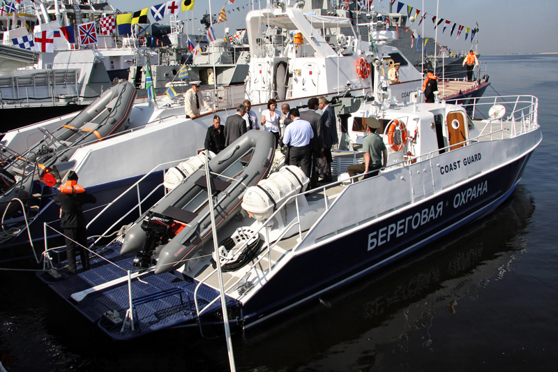 Сторожевой катер проекта 12150 Мангуст (Project 12150 Mangust patroal boat)